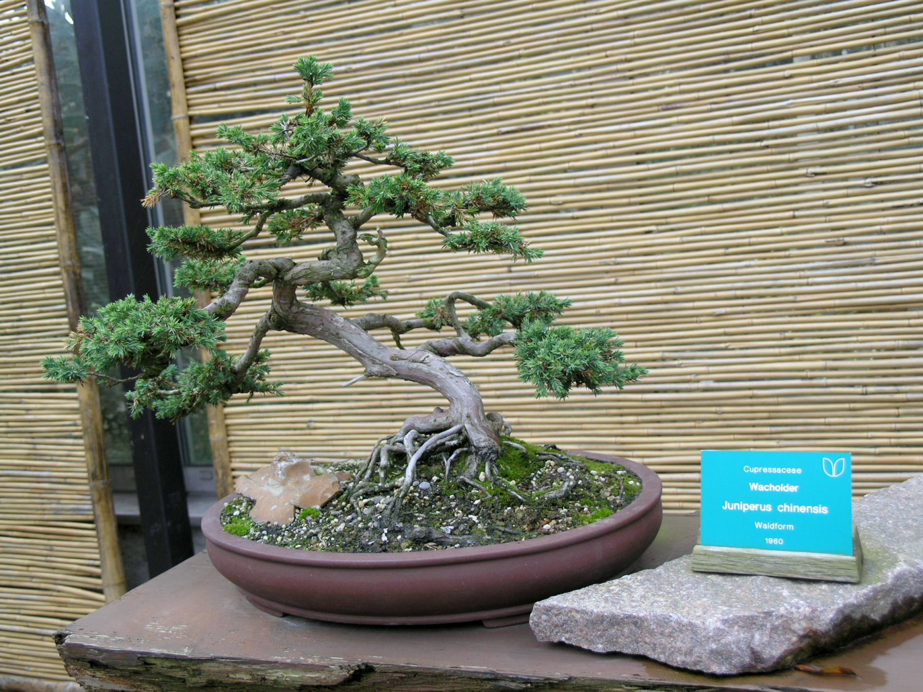 Bonsai (Grugapark Essen)